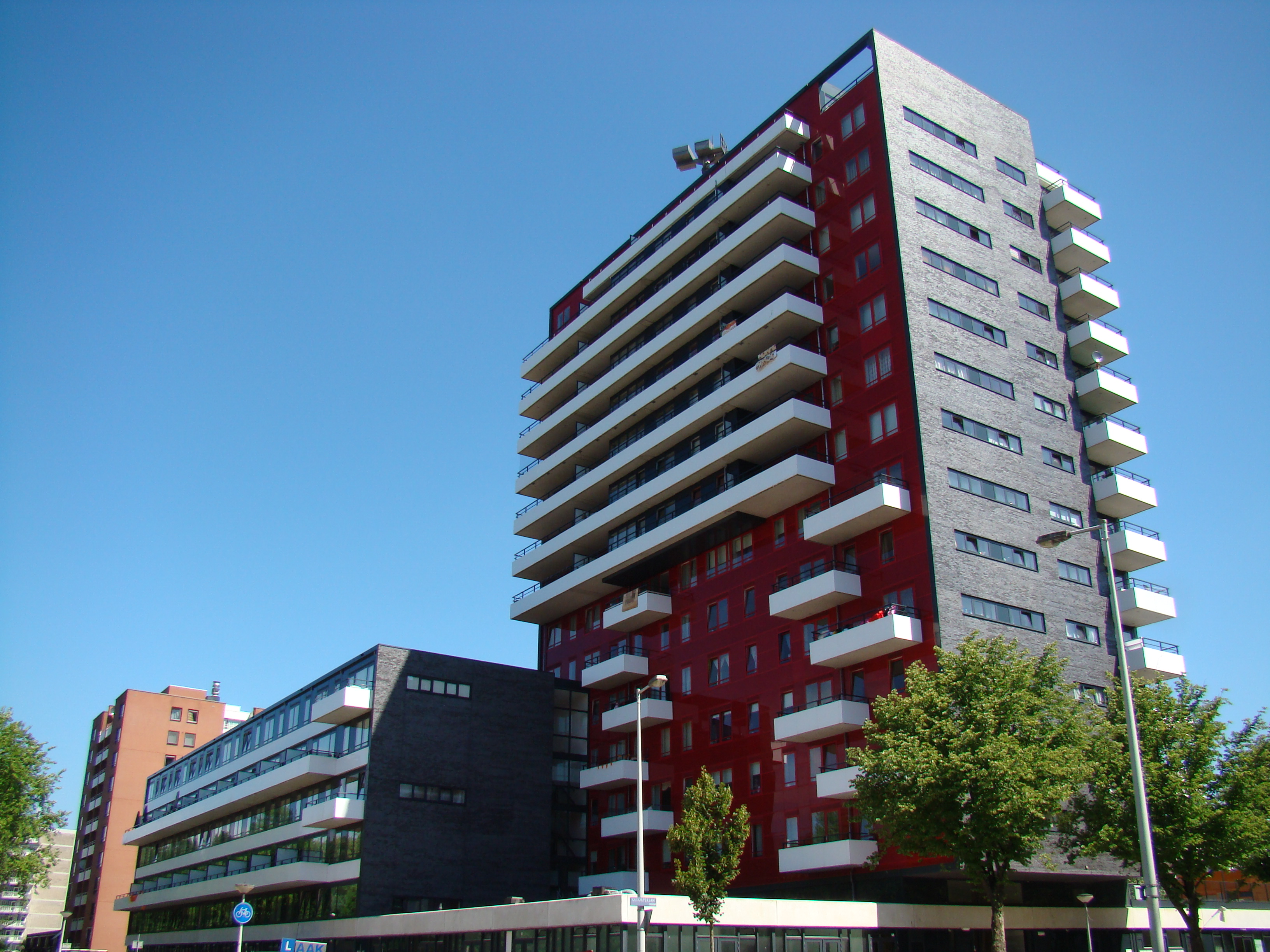 Impression of Osdorp (Netherlands) - Osdorperban bij Baden Powellweg.